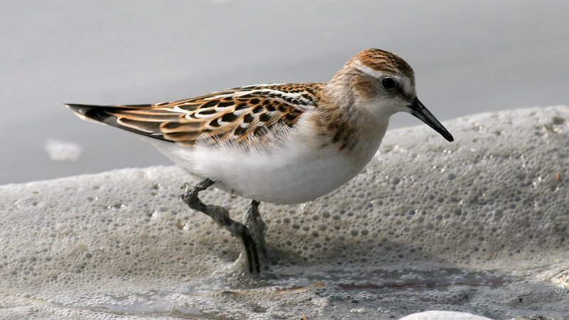 Little Stint (Calidris minuta)